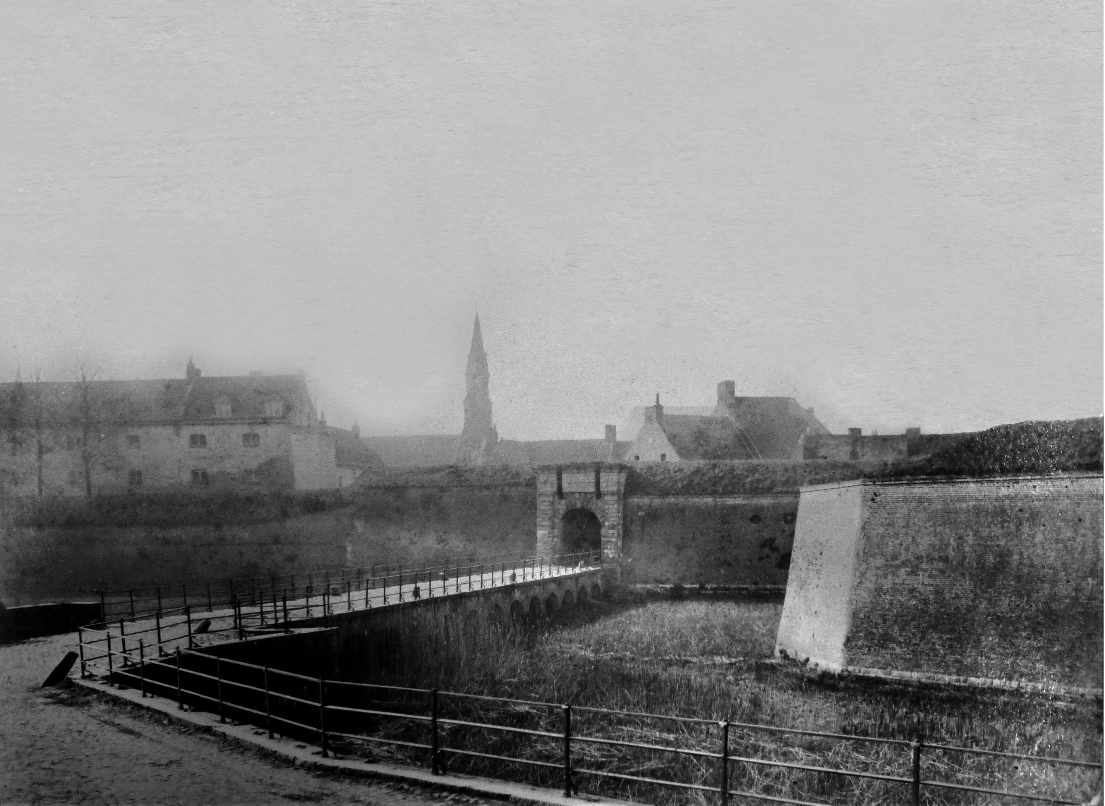 Fortifications Aire-sur-la-Lys Porte de Saint-Omer (Vue prise en 1893)